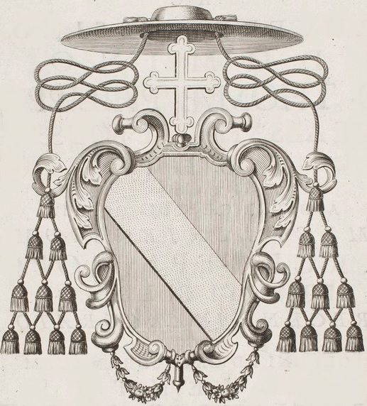 Illustrissimo ac reverendissimo Domino D. Thomæ Philippo de Alsatia, de Boussu [...] Mechliniensium archi-episcopo primati Belgii, &c. recens inaugurato [...] gratulatur et applaudit Gymnasium Societatis Jesu Mechliniæ [15] Martii M. D. CC. XVI. /.